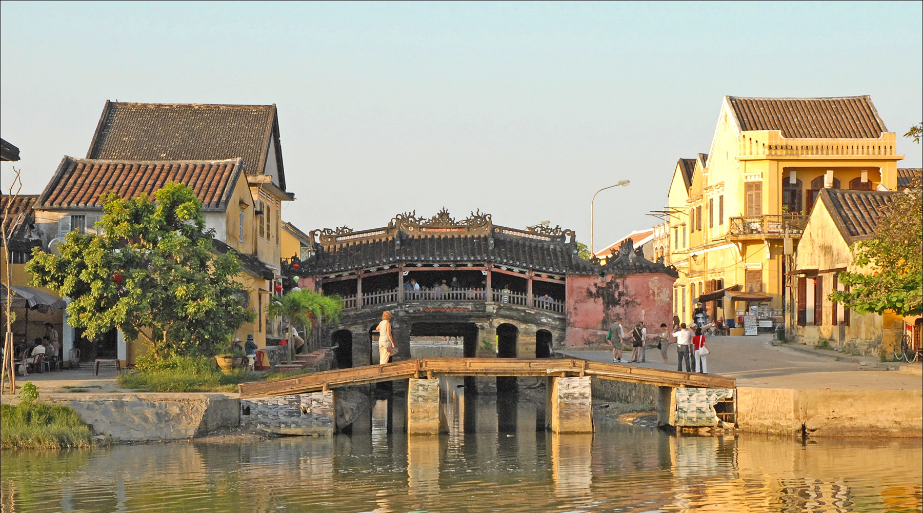 Chùa Cầu.